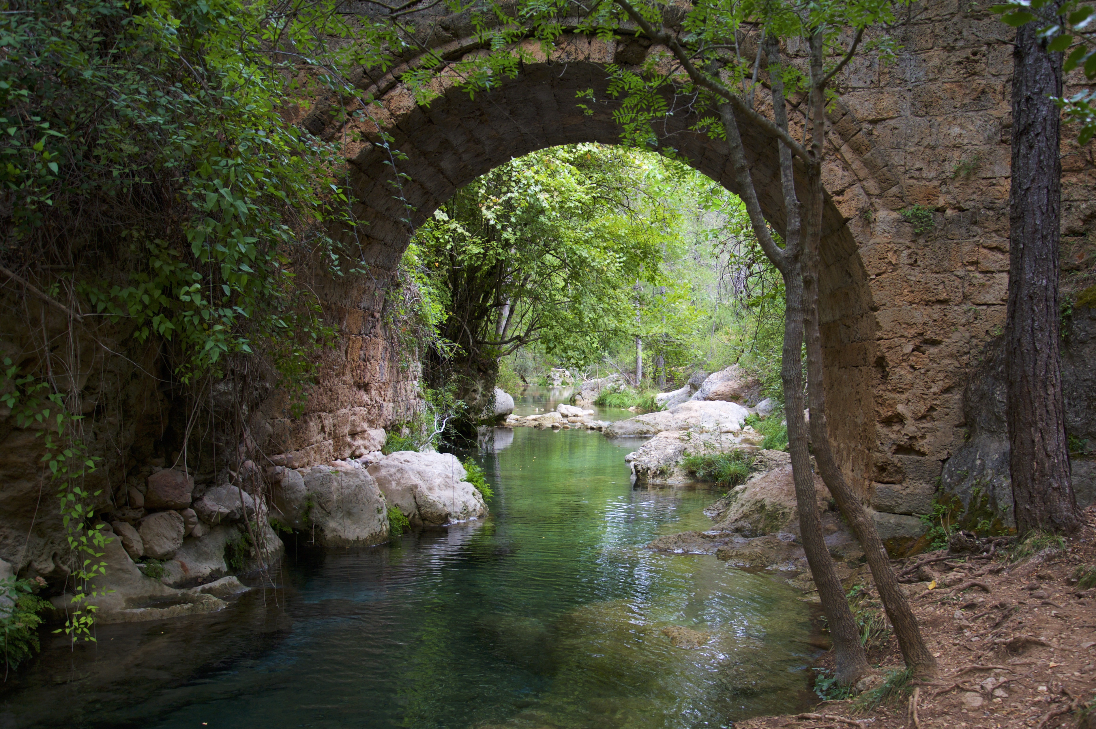 Parque natural de las Sierras de Cazorla, Segura y Las Villas This is a photography of a Site of Community Importance in Spain with the ID: ES0000035. Natura2000 entry, EEA entry